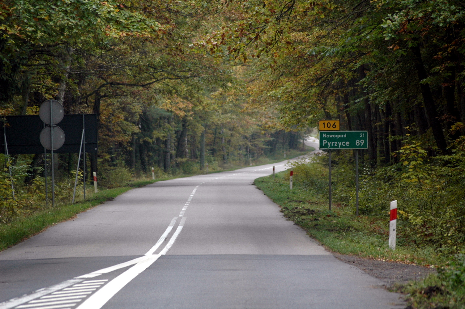 Droga wojewódzka nr 106 na 20 kilometrze.